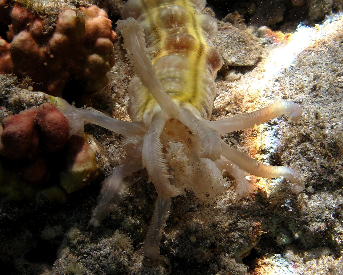 Détail de la bouche d'une holothurie Euapta godeffroyi à la Réunion.